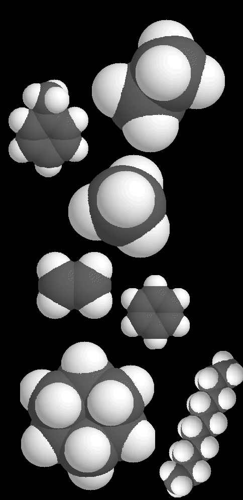 Kalottenmodelle von Kohlenwasserstoffen Ersteller der Kalottenmodelle ist Aglarech, zusammengefügt wurden sie von Van Flamm, Vorlage waren Bild:Methan.png, Bild:Ethan.png, Bild:Cyclohexanmolekülmodell.png, Bild:Kalottenmodell Ethen.png, Bild:Kalottenmodell Benzol.png, Bild:Kalottenmodell Toluol.png